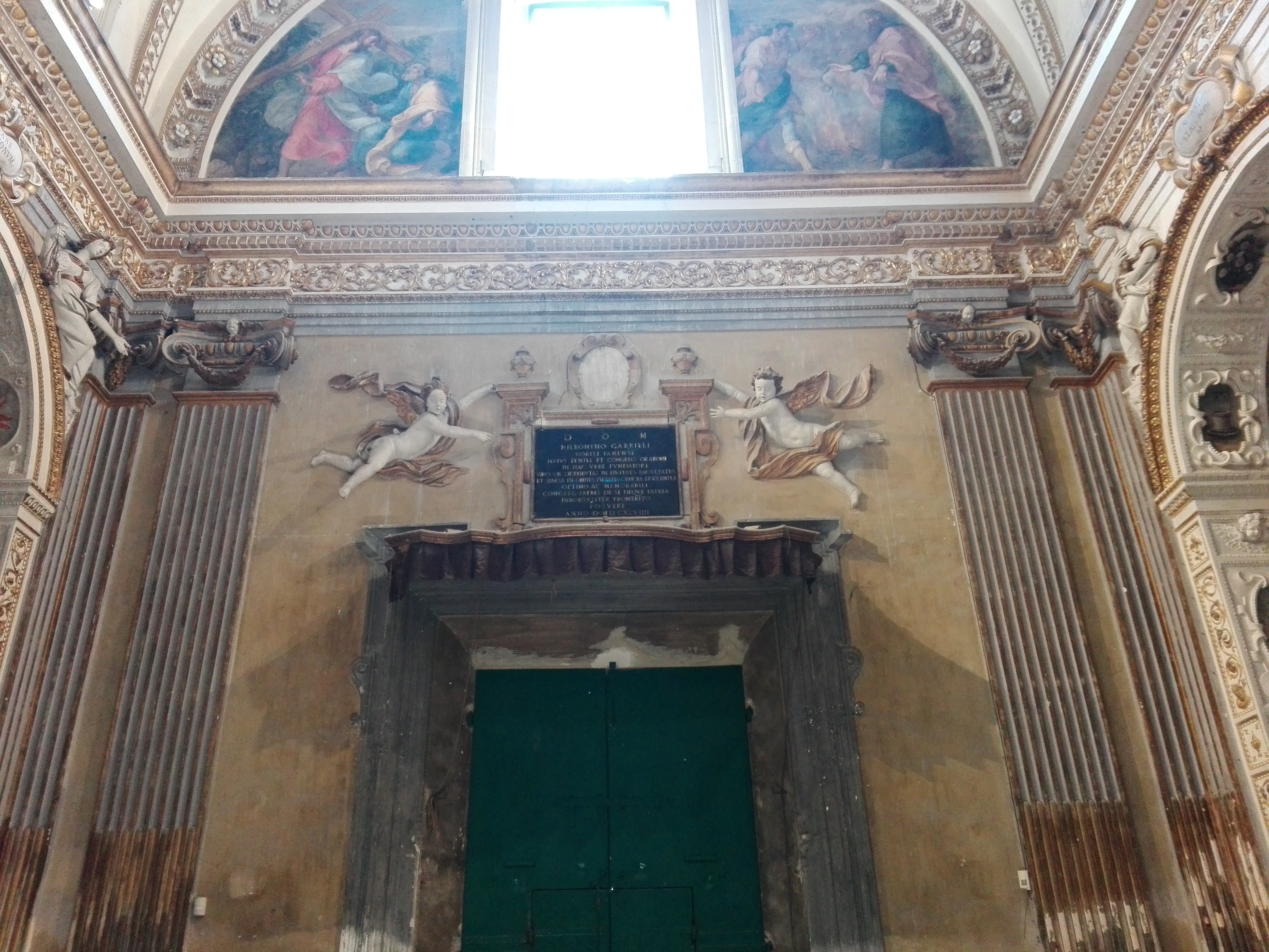 Chiesa